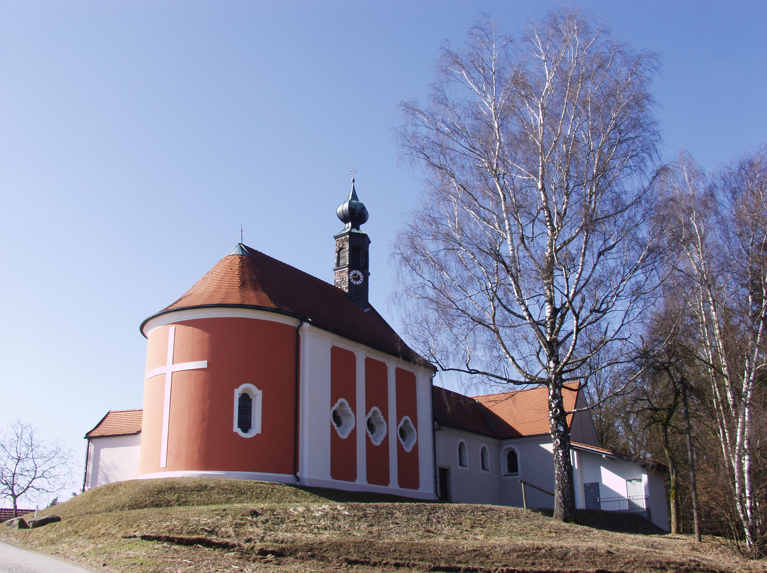 Wallfahrtskirche Hl. Kreuz in der Gemeinde Windberg